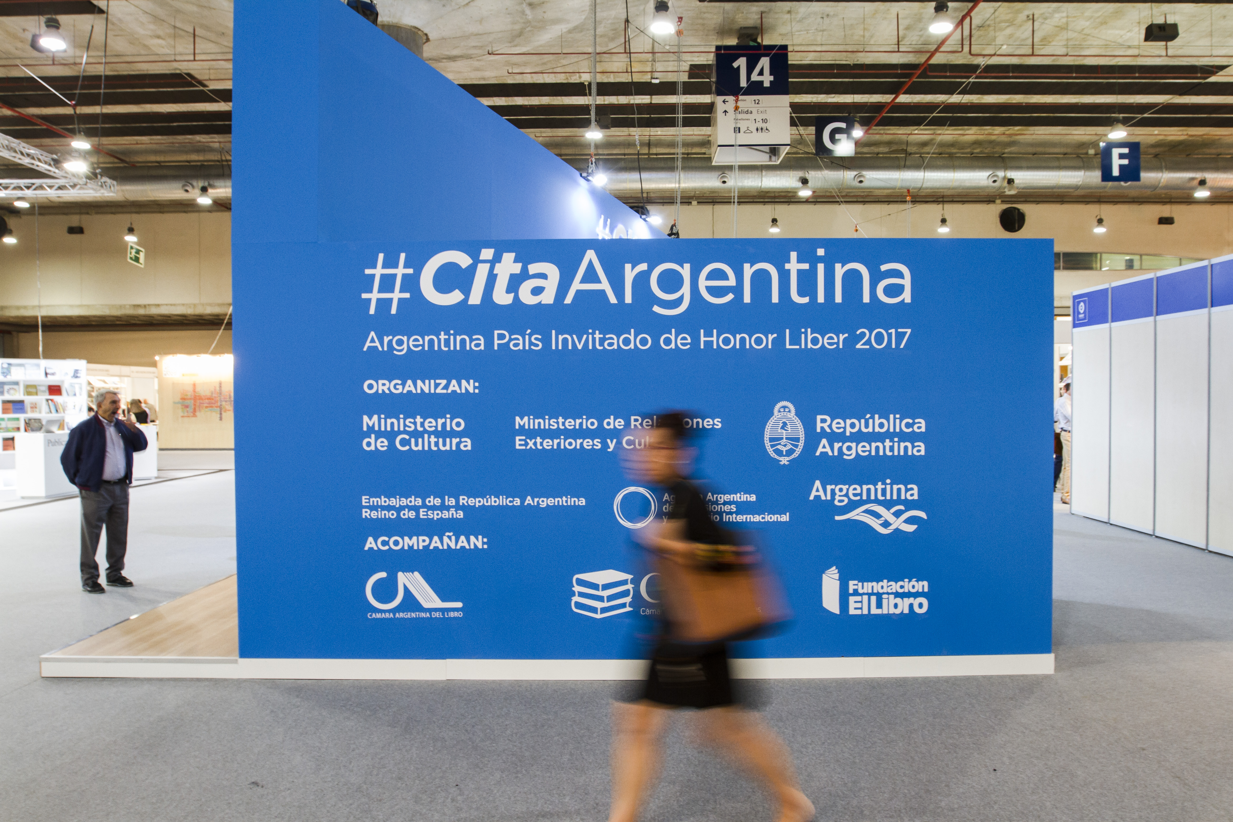 Madrid, 4 de octubre de 2017 - En el predio de "IFEMA" se realiza la feria "Liber 17" donde Argentina es el país invitado de honor. Fotos: Mauro Rico / Ministerio de Cultura de la Nación.